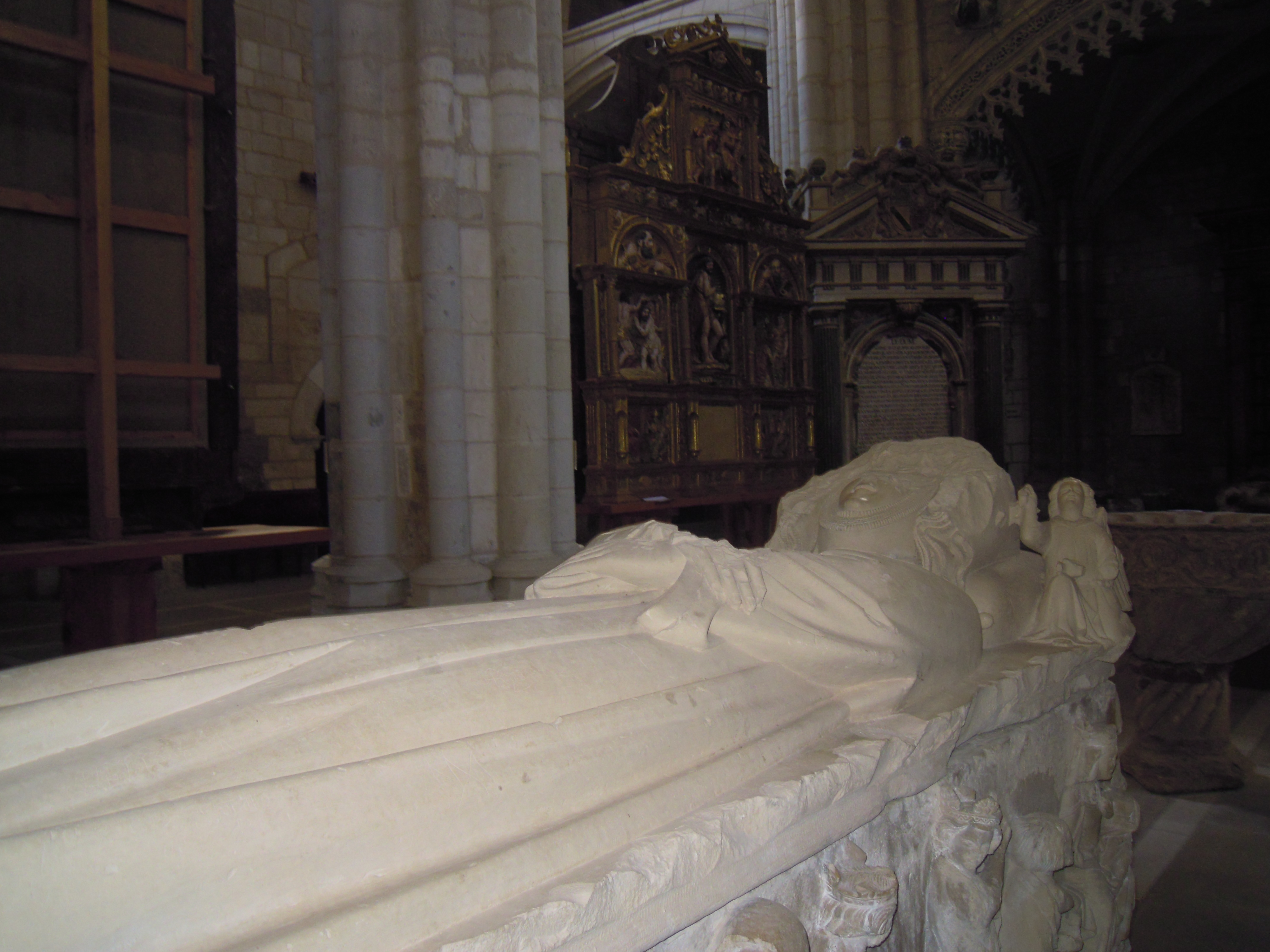 Urraca López de Haro_sepulcro en Museo Retablo_Burgos_1